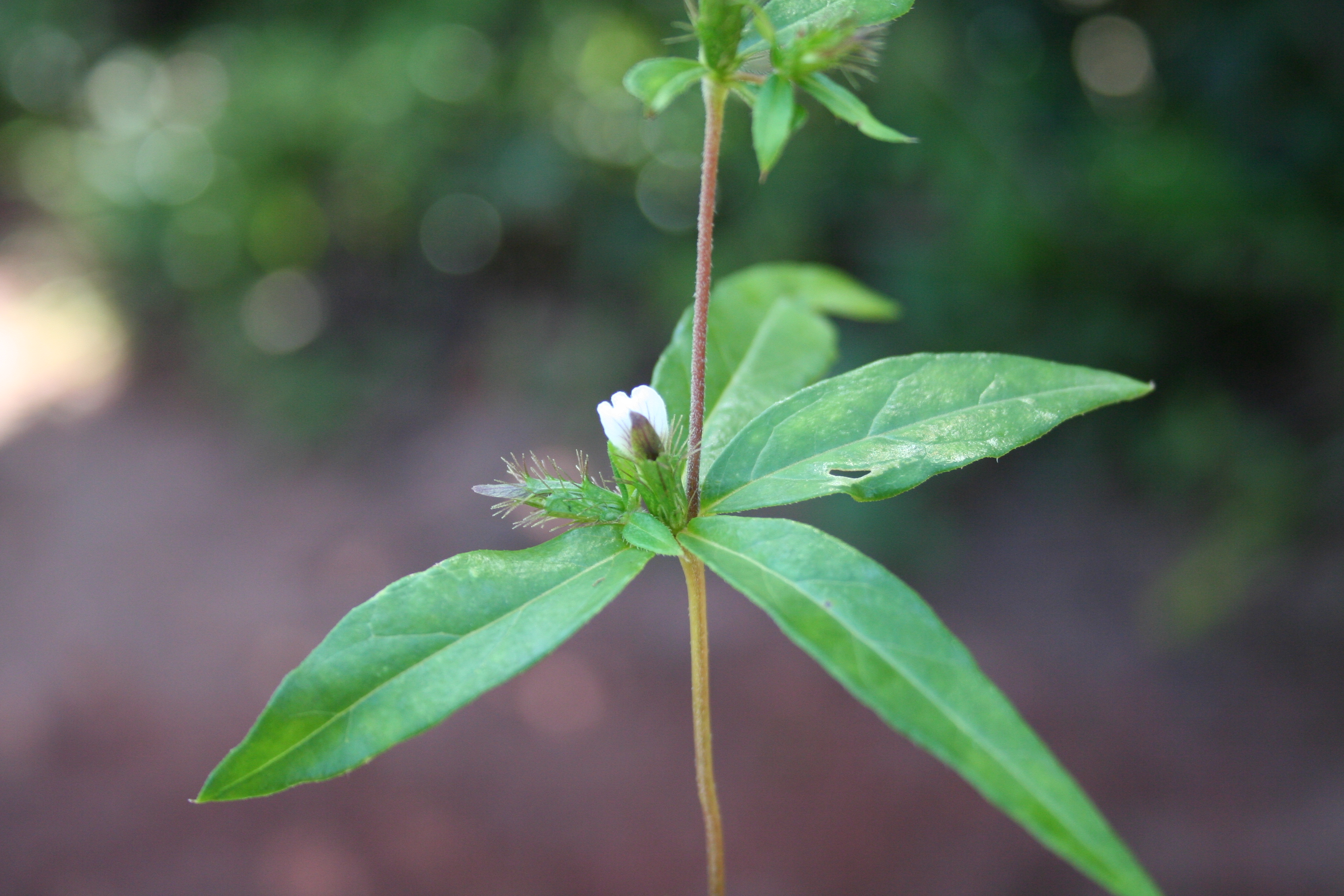 Blepharis maderaspatensis, SW Burkina Faso